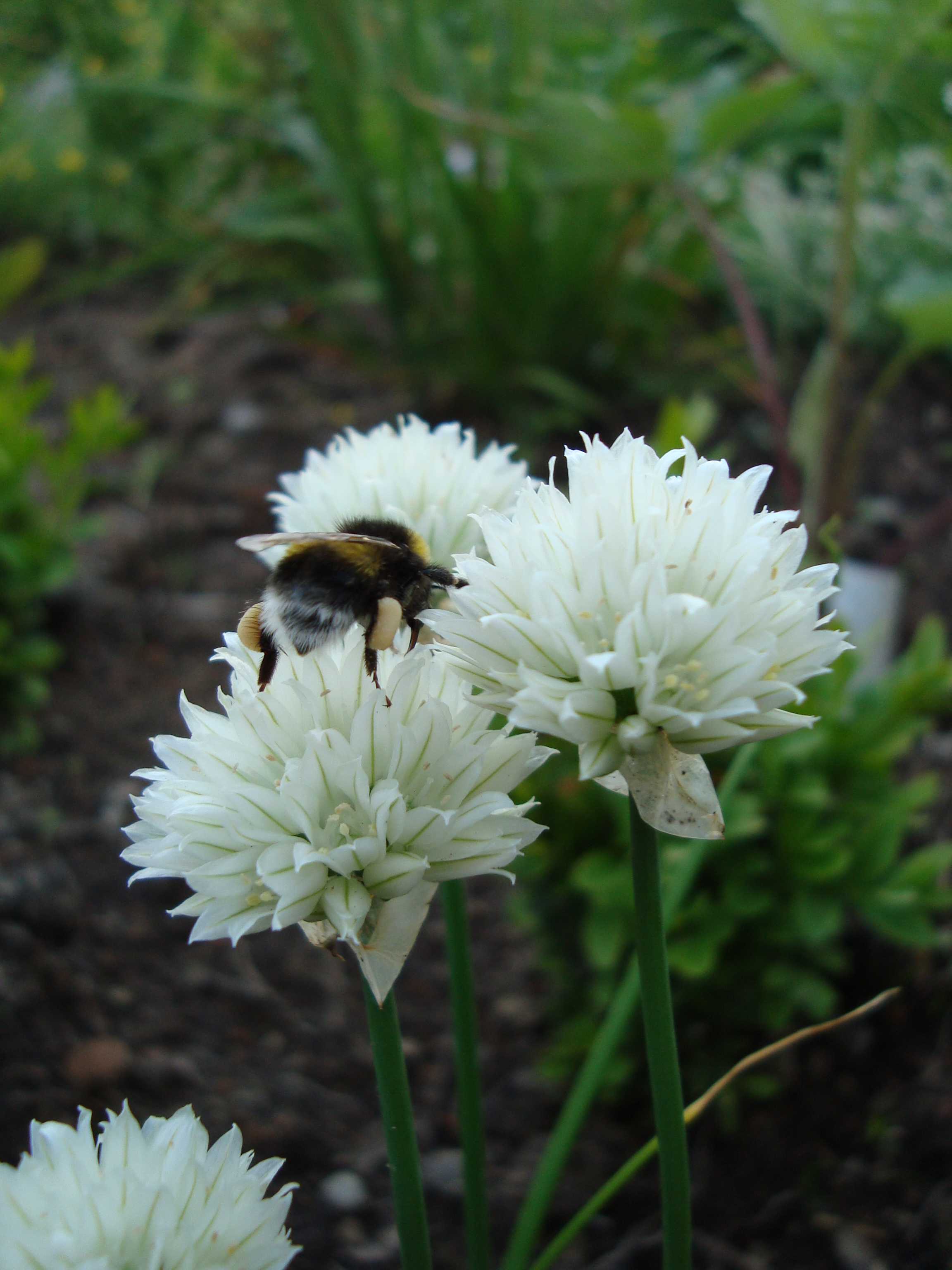 Allium schoenoprasum 'Album'